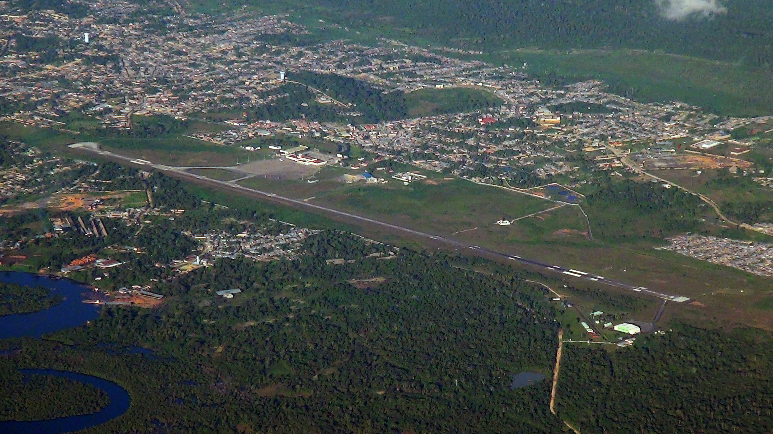 Aeropuerto Internacional Francisco Secada Vignetta